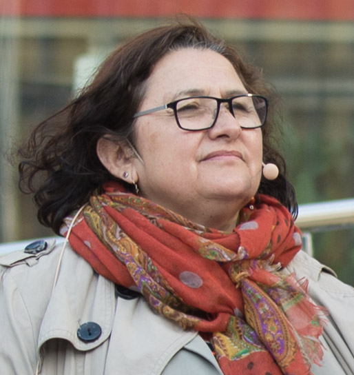 Irene Molina Vega i en bostadsdebatt mitt på Sergels Torg i Stockholm. Arrangör: Kulturhuset Stadsteatern, Forum/Debatt, den 3 juni 2015.